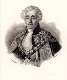 Gravure sur acier originale dessinée par Durupt, gravée par T. Goutière. Chine-collé.